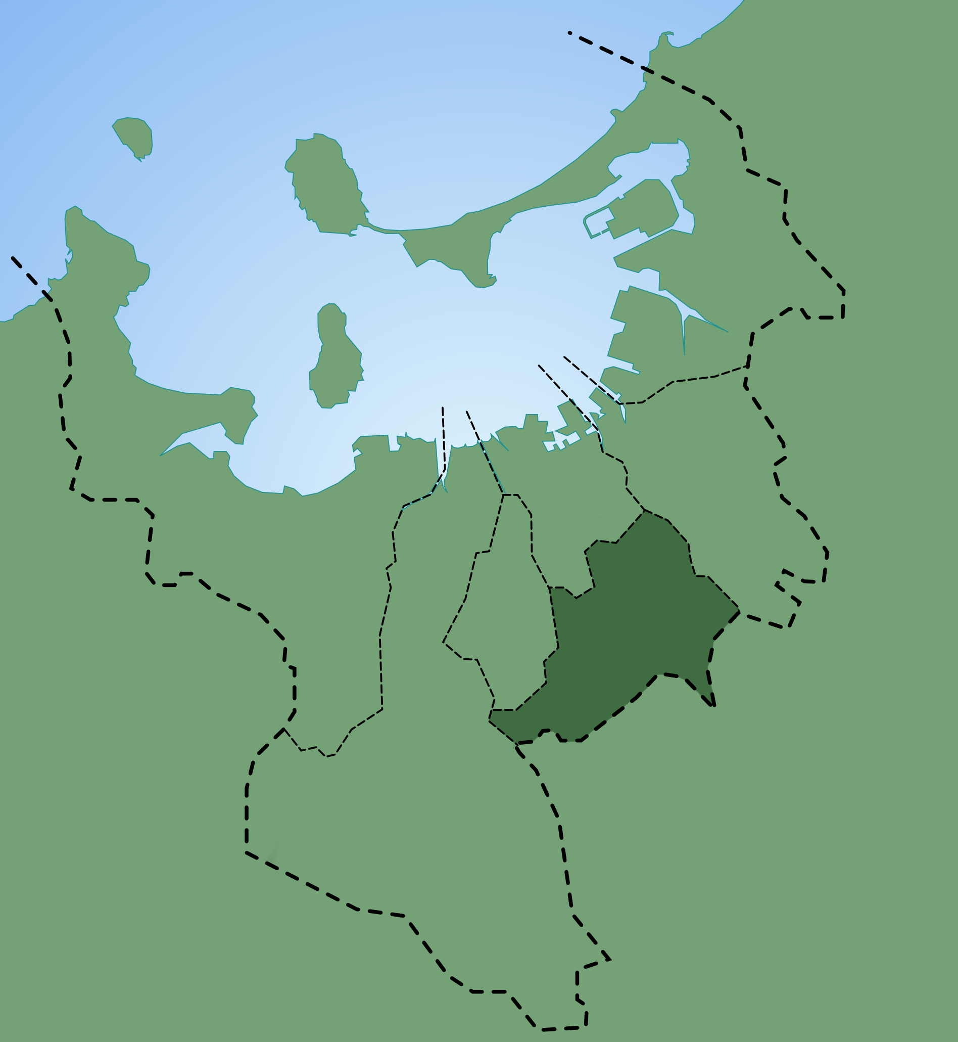 Minami-ward of Fukuoka, Fukuoka in Japan.